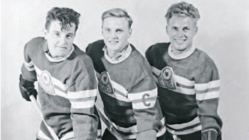 Jääkiekkoseura Töölön Vesan pelaajat Veikko Haapakoski, Pentti Simola ja Kai Halimo aikavälillä 1955-1964. Sama kuva löytyy 45 Jokeria pakan päältä -kirjan sivulta 12, jossa tiedot mainitaan.